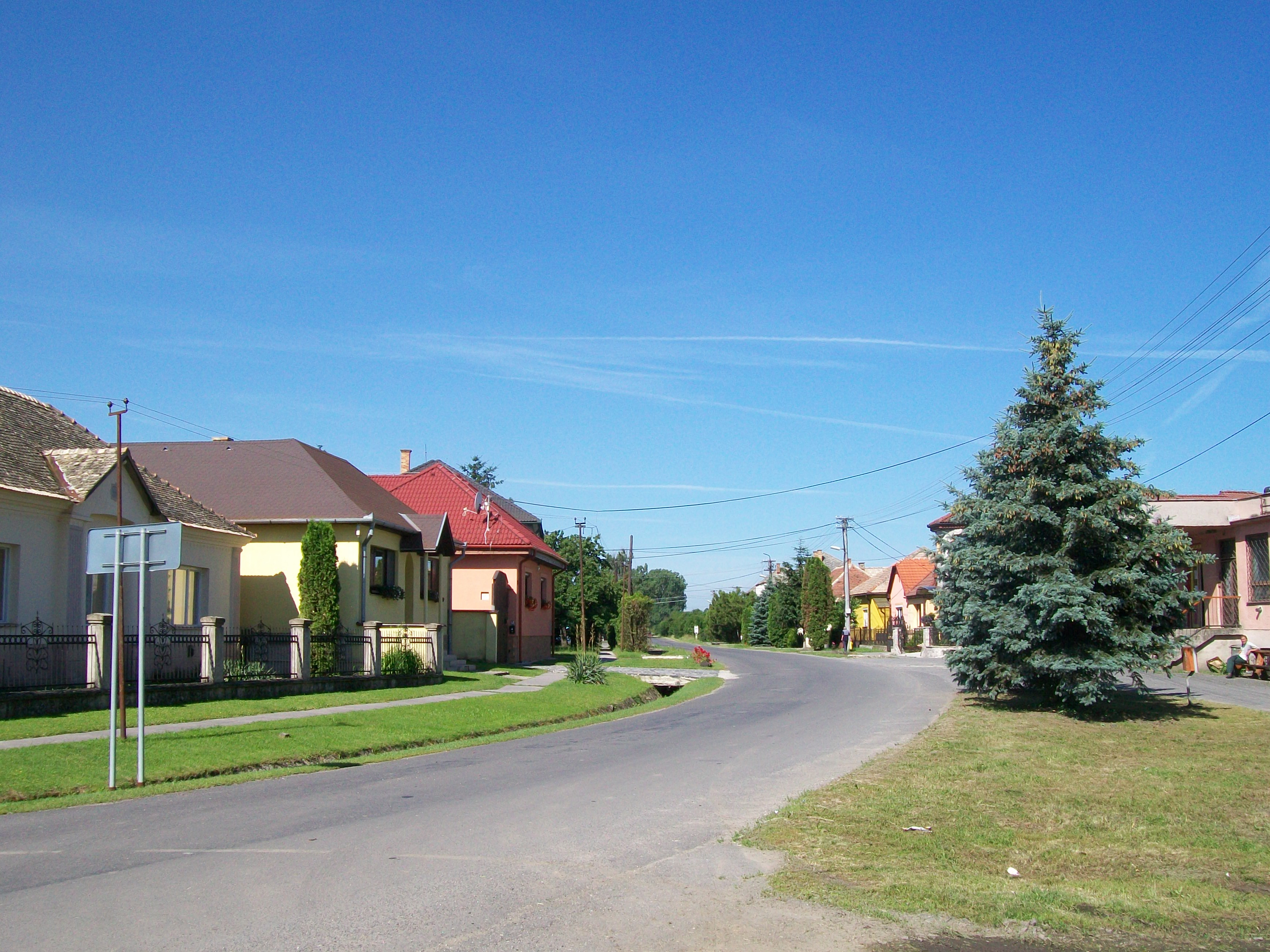 Ulica obce Boľkovce